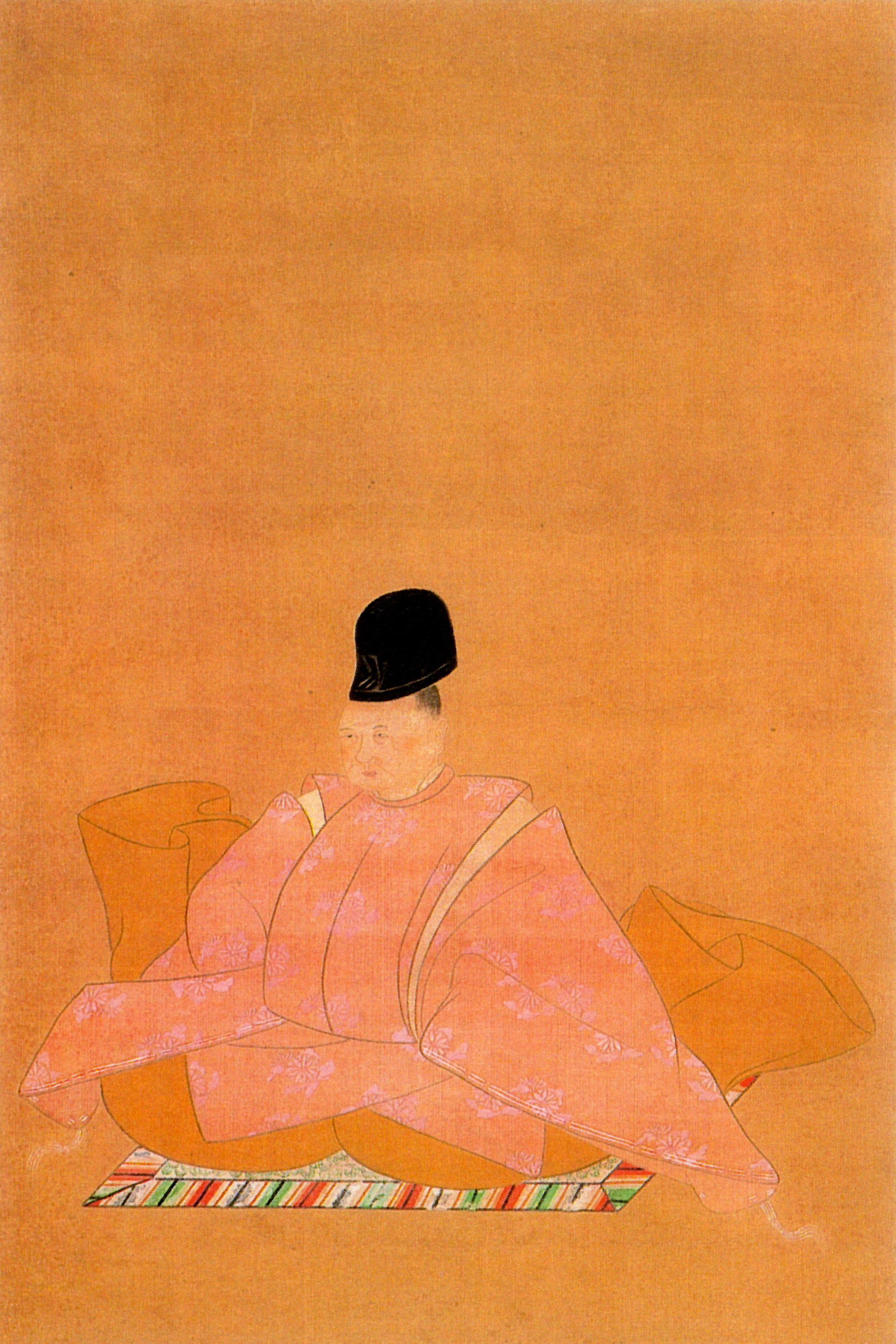 京極宮家仁親王の肖像。